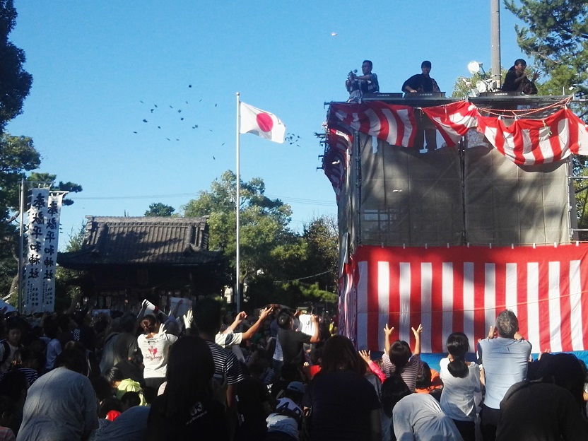 Mochi Nage, Tsushima jinja, Hekinan